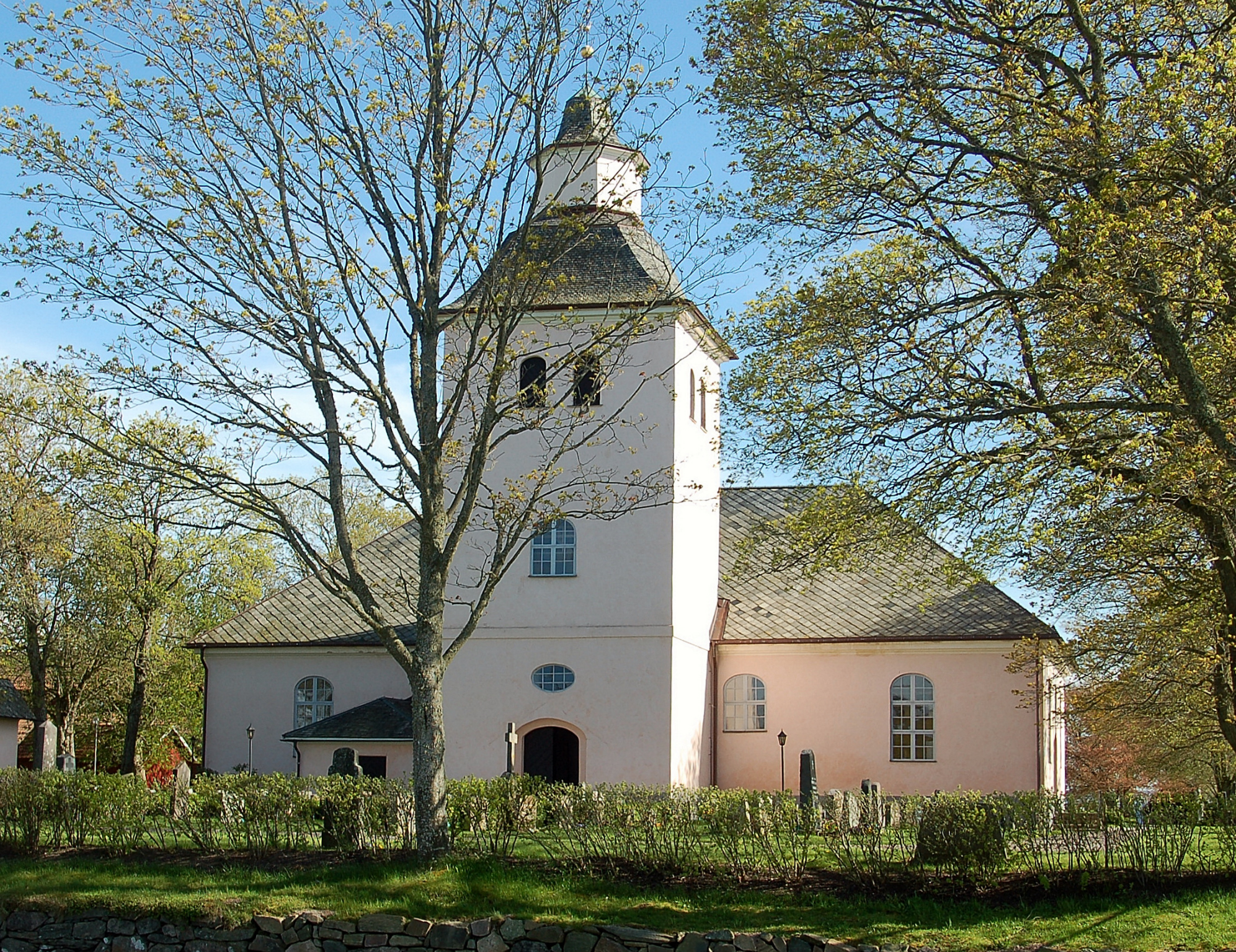 Rudskoga kyrka från norr.